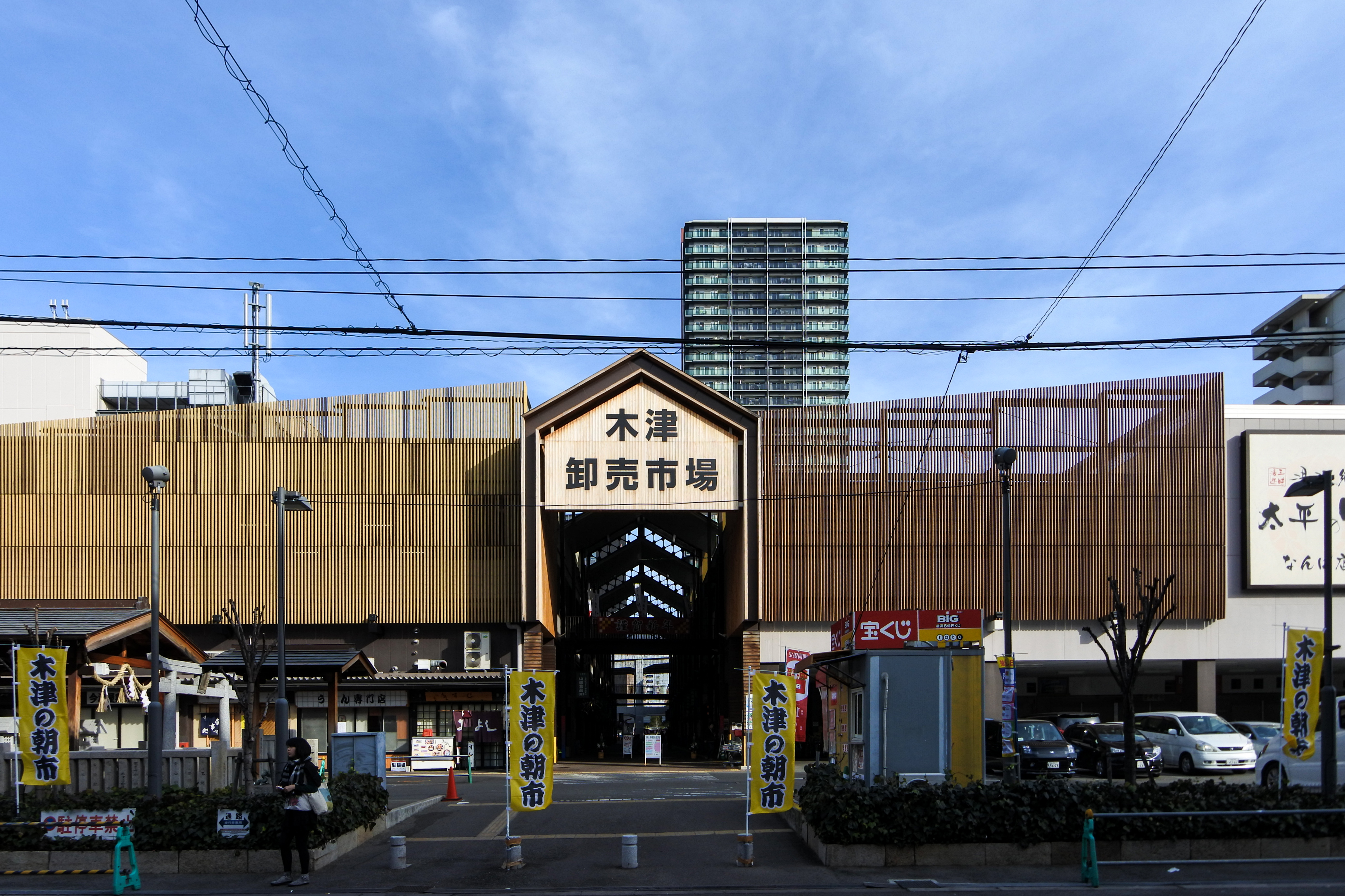 Jan 7, 2018 at 14:18, Osaka 浪速区敷津東